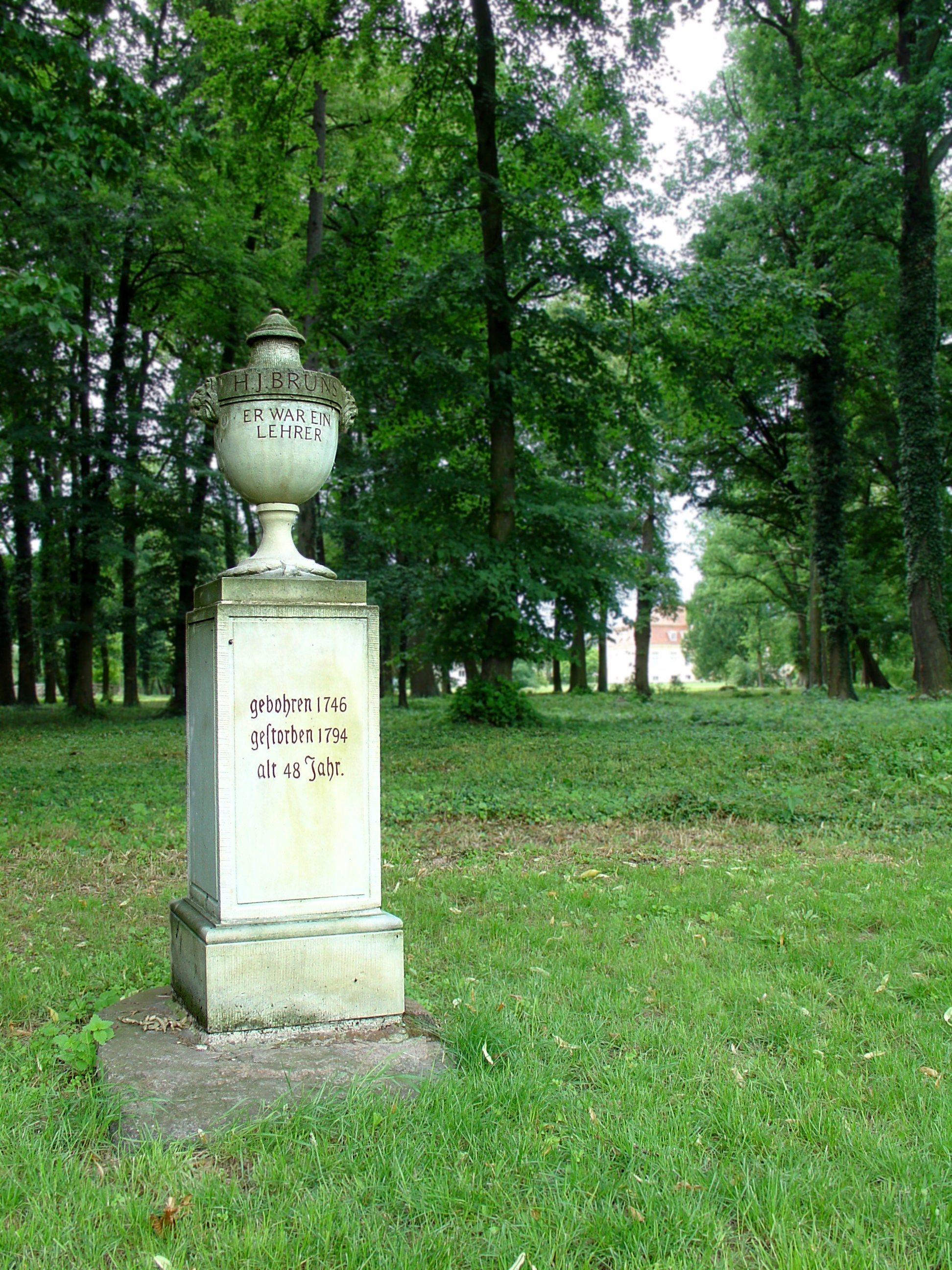 Denkmal für den Lehrer J. H. Bruns, Schlosspark Reckahn (Brandenburg) / memorial for the teacher J. H. Bruns, park of Reckahn Manor (Brandenburg, Germany)